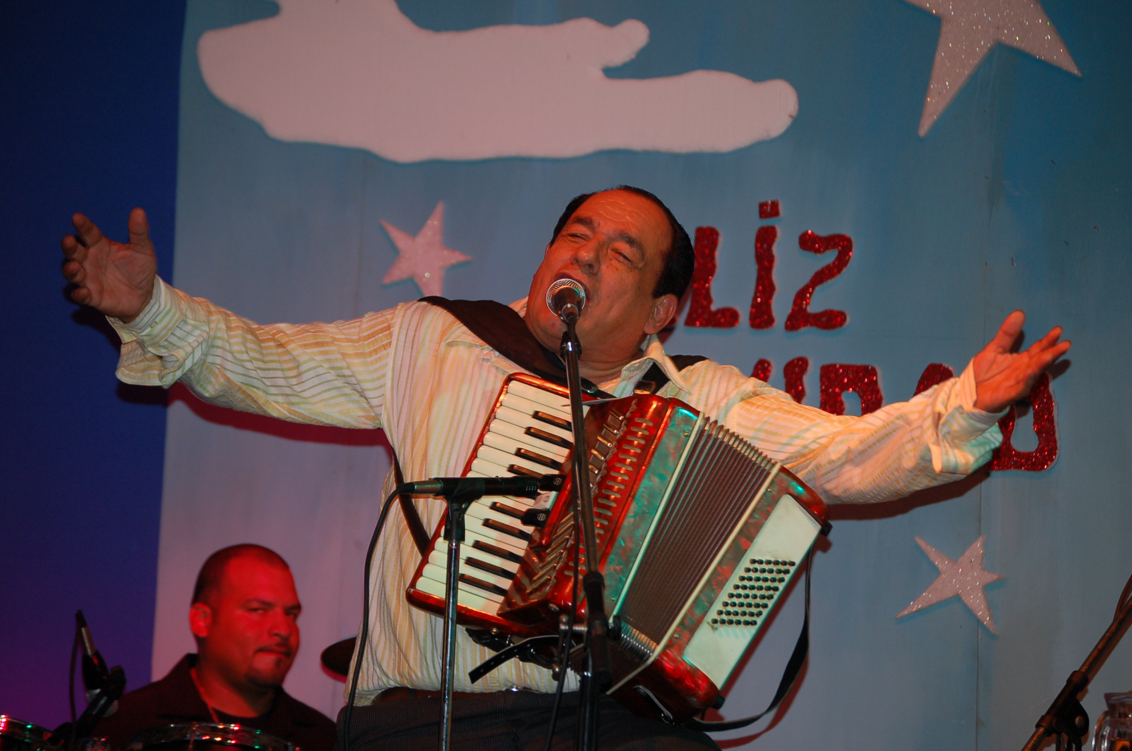 X Aniversario Fundación Mejía Godoy Carlos Mejía Godoy